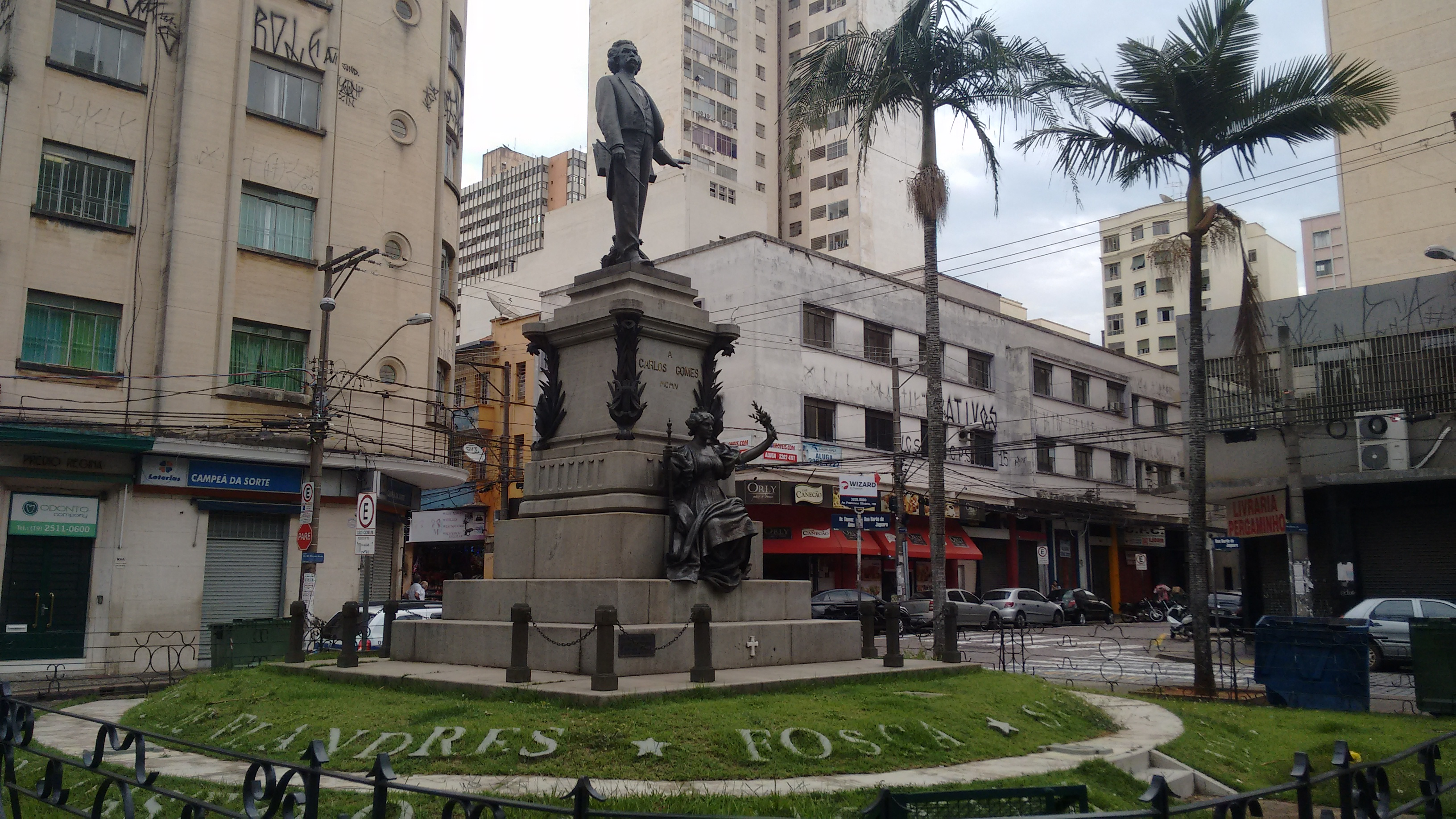 Monumento-túmulo a Carlos Gomes